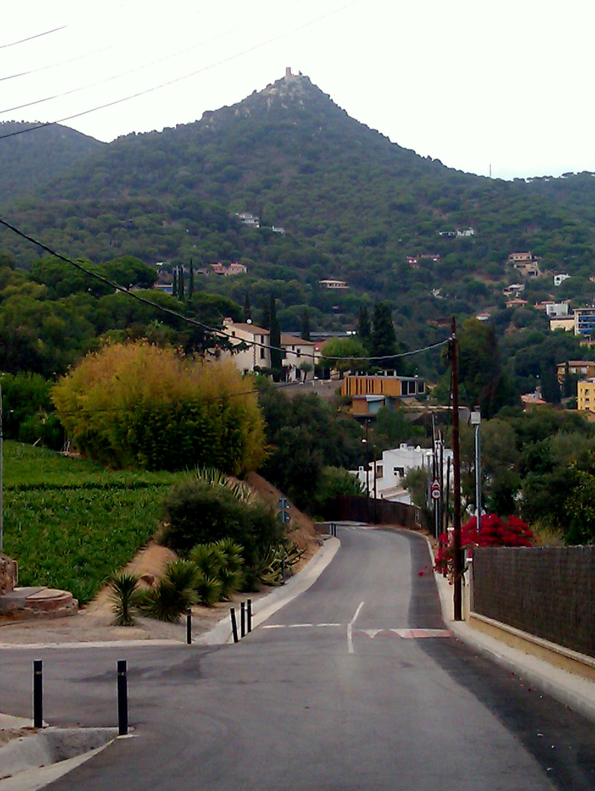 Castell de Burriac des de cabrera de Mar This is a photography of a Special Area of Conservation in Spain with the ID: ES5110011. Natura2000 entry, EEA entry